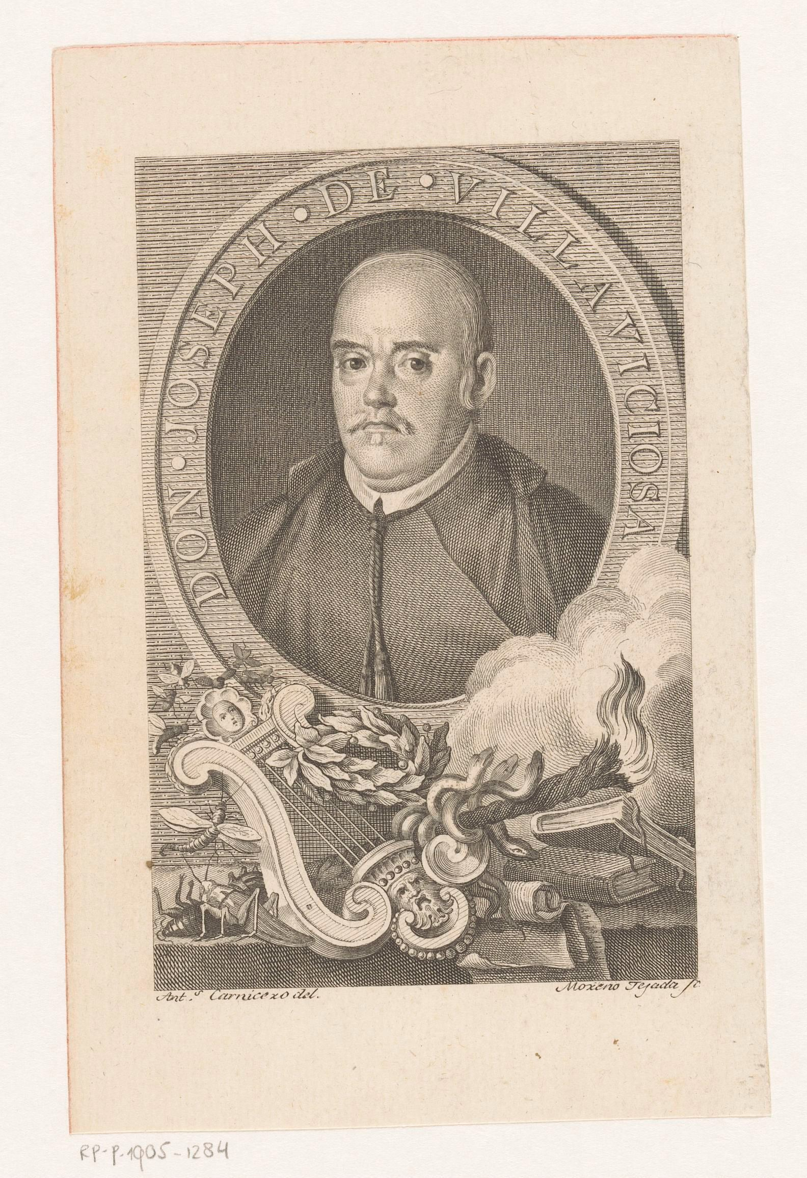 IdentificatieTitel(s): Portret van dichter José de VillaviciosaObjecttype: prent boekillustratie Objectnummer: RP-P-1905-1284Opschriften / Merken: verzamelaarsmerk, verso, gestempeld: Lugt 2228VervaardigingVervaardiger: prentmaker: Juan Moreno Tejada (vermeld op object)naar tekening van: Antonio Carnicero (vermeld op object)uitgever: Antonio de SanchaPlaats vervaardiging: prentmaker: Spanjeuitgever: MadridDatering: 1777Fysieke kenmerken: ets en gravure; tekst in boekdruk op versoMateriaal: papier Techniek: etsen / graveren (drukprocedé)Afmetingen: blad: h 170 mm × b 108 mmToelichtingPrent gebruikt voor de publicatie: Villaviciosa, José de. La Mosquea, poetica inventiva. Madrid: Antonio de Sancha, 1777.OnderwerpWat: historical personswriter, poet, authorlyre, cithara, psalteryinsectsWie: José de VillaviciosaVerwerving en rechtenVerwerving: aankoop 1905Copyright: Publiek domein